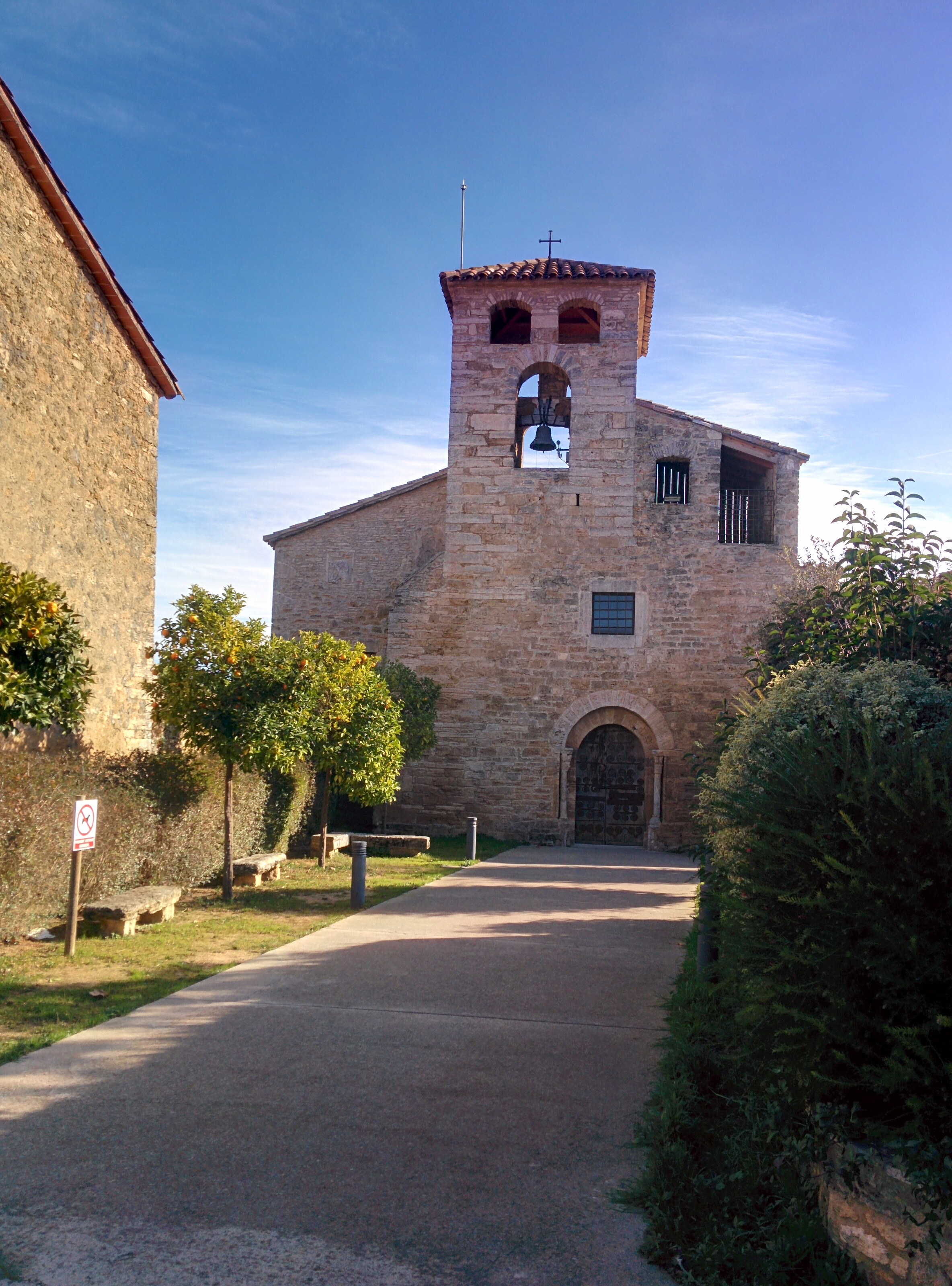 Església parroquial de Sant Julià (Cornellà del Terri)